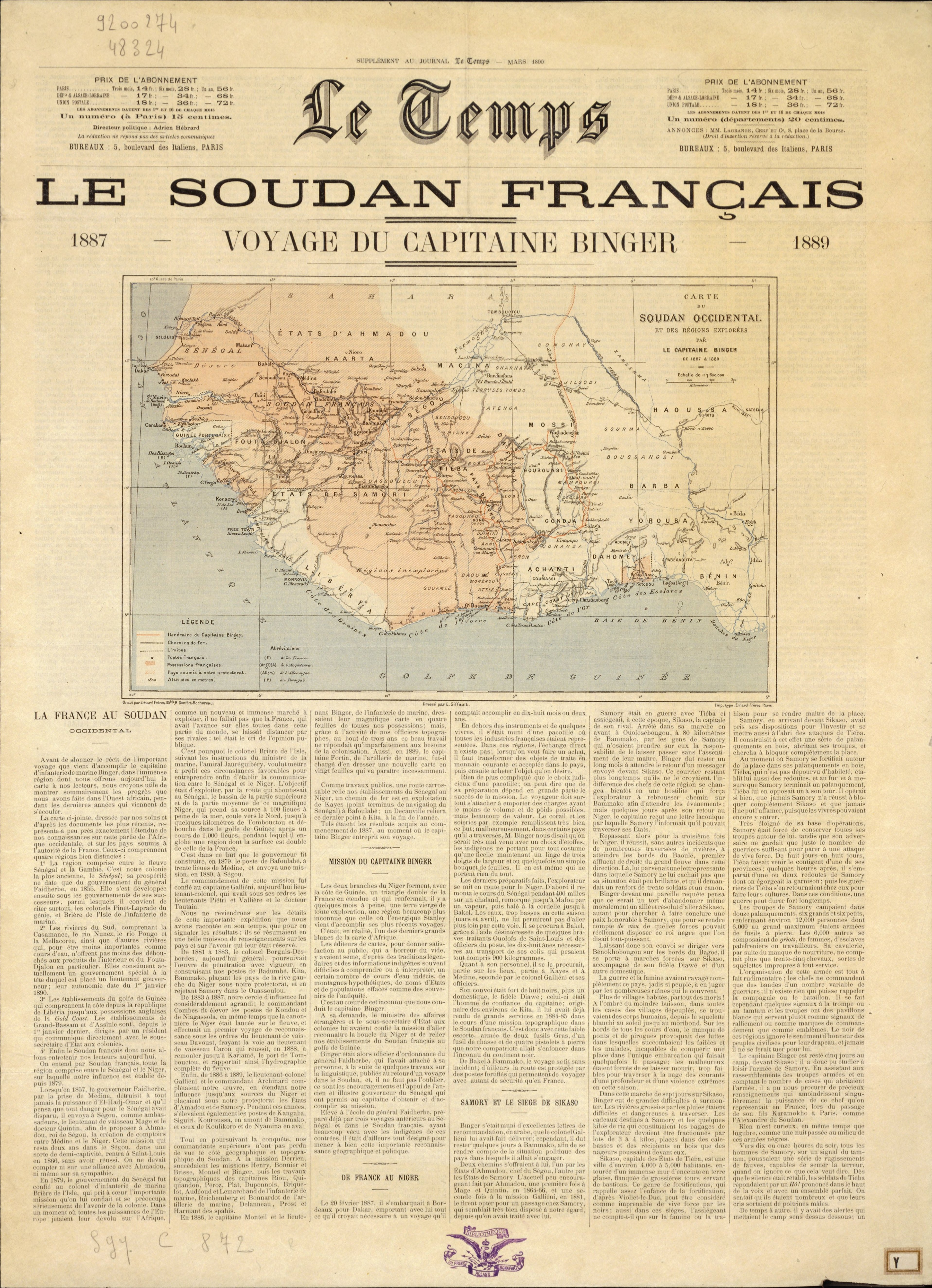 Carte du Soudan occidental et des régions explorées par le capitaine Binger de 1887 à 1889 / dressé par E. Giffault" publié dans Le Temps